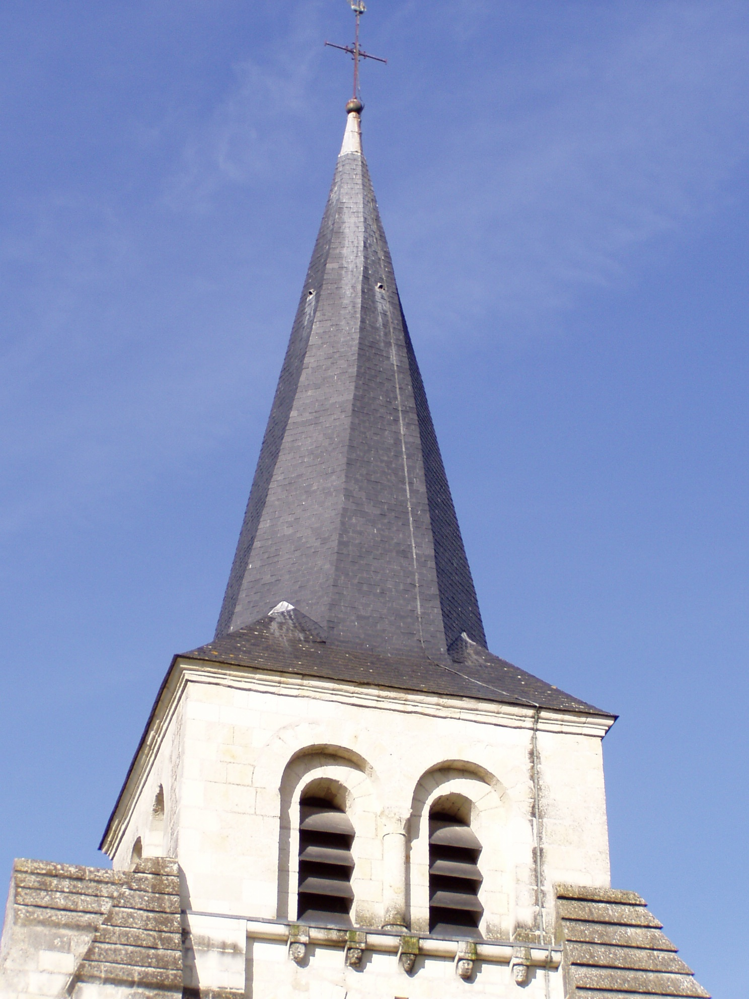 Distré (Maine et Loire) clocher à flèche de type "tors" de l'église Saint-Julien